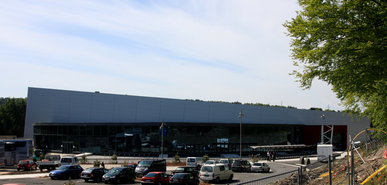 Sørmarka arena